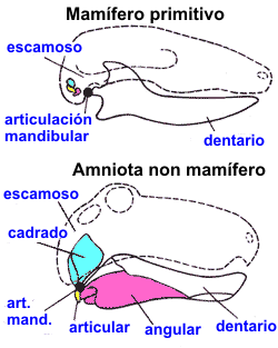 evolución da mandíbula e ósos do oído